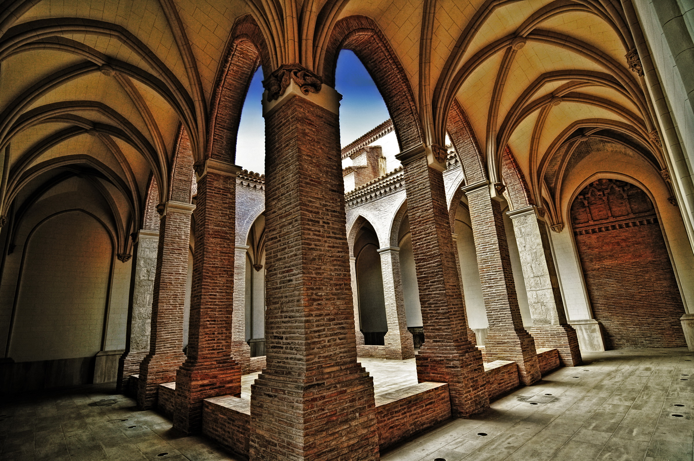 Claustro mudejar de la iglesia de San Pedro (Teruel)